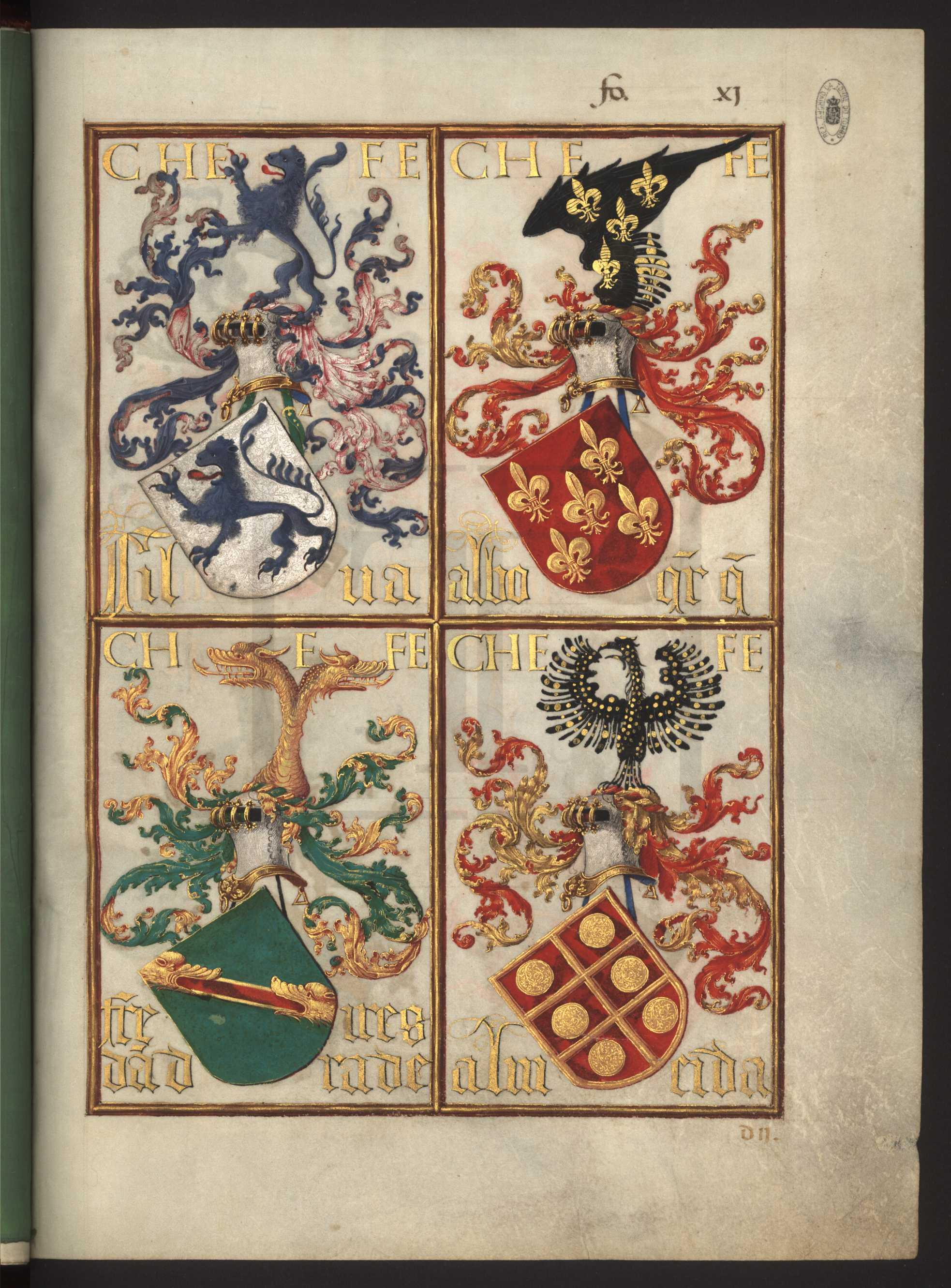 Armas das Familias da Silva, Albuquerque, Freire de Andrade, Almeida.